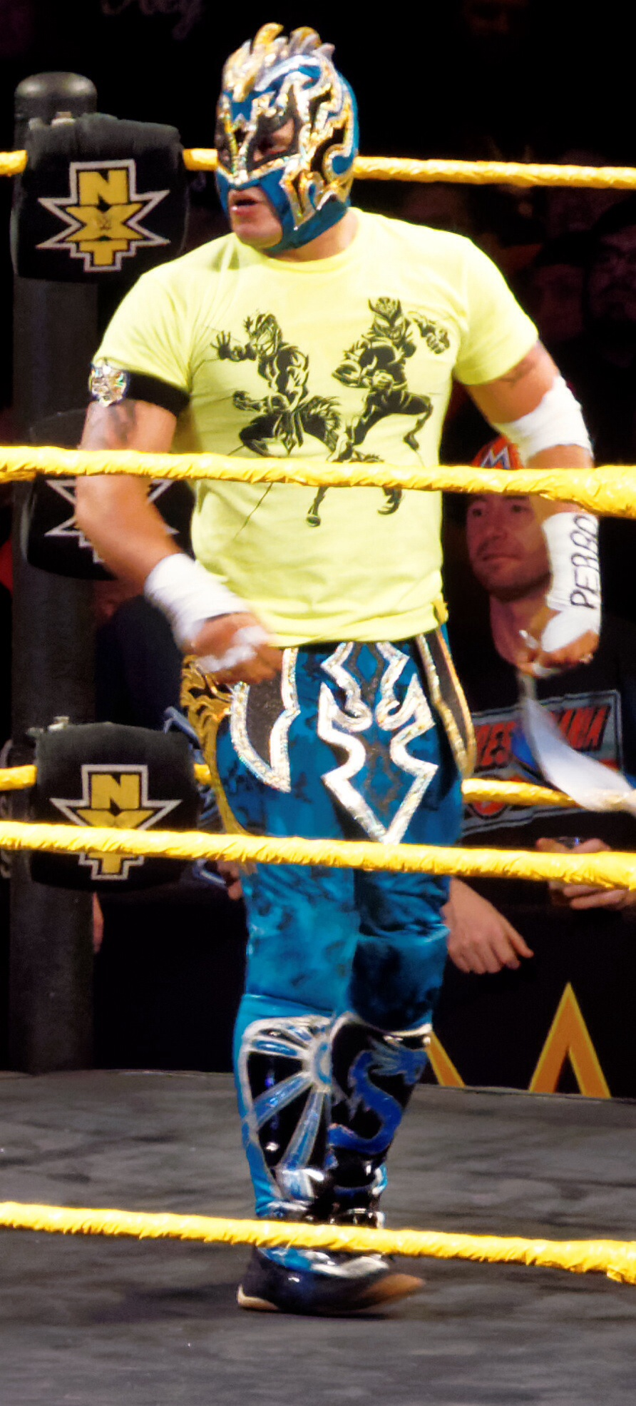 2015-03-27_23-01-11_ILCE-6000_3486_DxO